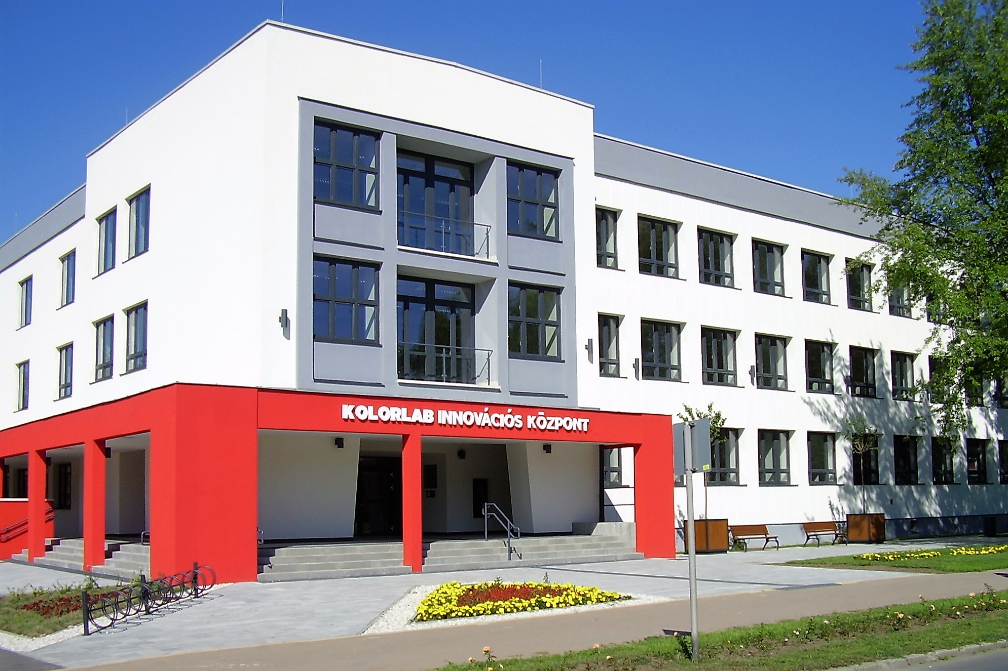 KOLORLAB Innovációs Központ Kazincbarcikán. Ez az épület korábban oktatási intézményként működött: Központi Általános Iskola néven. 2016–2017-ben felújították.